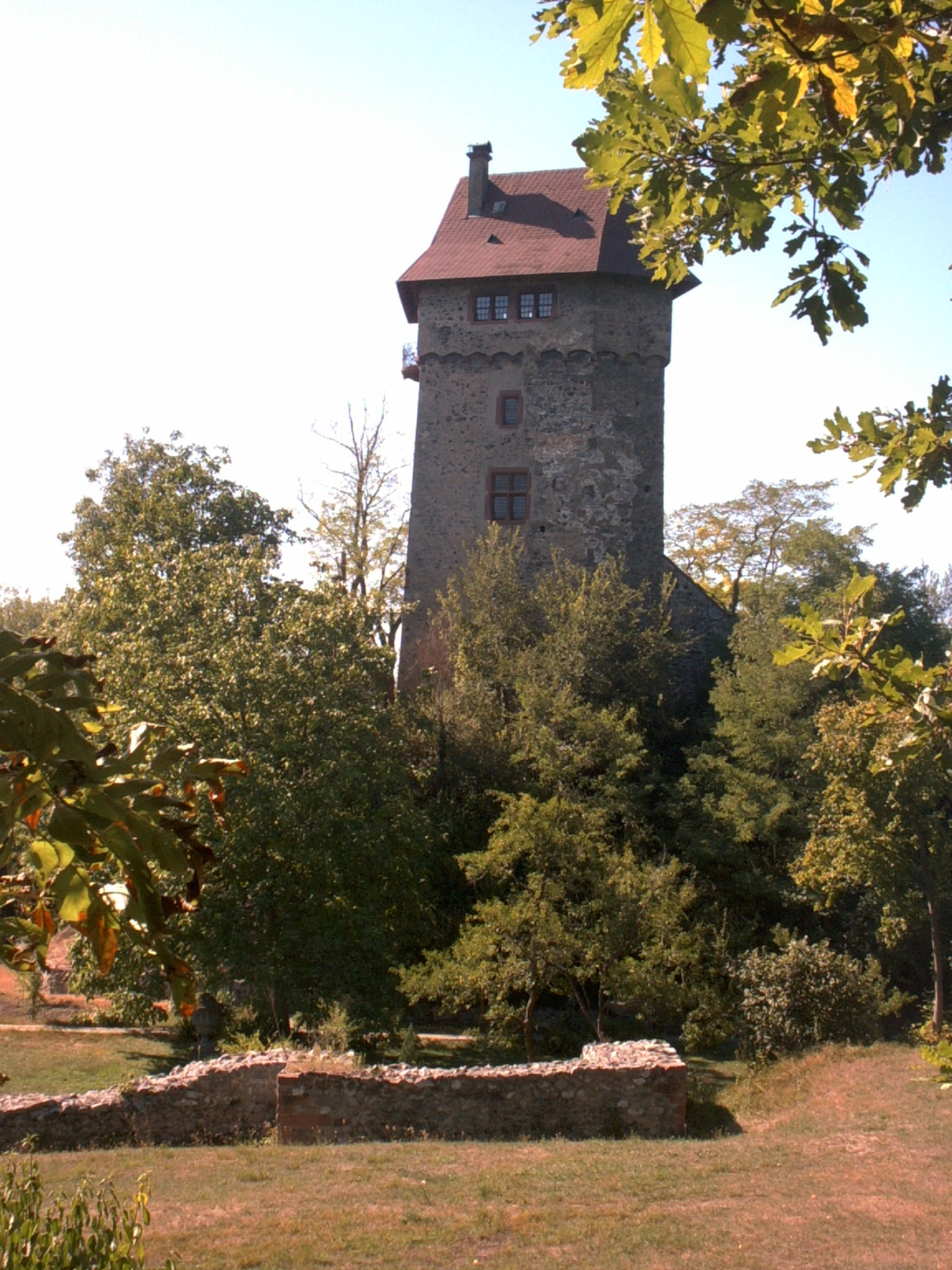 Burg Sponneck, Sasbach am Kaiserstuhl, Rhein. Nach 1333 ging die Burg an die Grafen von Württemberg, denen sie als Brückenkopf zur Grafschaft Horburg im Elsaß diente. Nach der Vertreibung von Herzog Ulrich von Württemberg kam die Burg 1525 in den Besitz von Caspar Fabri und 1540 an Jacob von Berckheim. Etwa um 1550 ging die Burg zurück in Württembergischen Besitz an die Mömpelgardische (Montbéliard) Linie, vermutlich schon baufällig. Im Dreißigjährigen Krieg war die Burg Ruine. Der Name der mit dem Haus Württemberg verwandten Grafen von Sponeck leitet sich von der Burg ab. Nach mehreren Besitzerwechseln hatte 1917 der Maler Hans Adolf Bühler die Burg erworben, sie wieder aufgebaut und im ehemaligen Wohnturm ein Atelier eingerichtet. Am Wiederaufbau waren unter anderem der Freiburger Architekt Carl Anton Meckel sowie das Unternehmen Brenzinger & Cie. beteiligt. Nach dem Tod des Malers 1951 blieb die Burg im Familienbesitz.